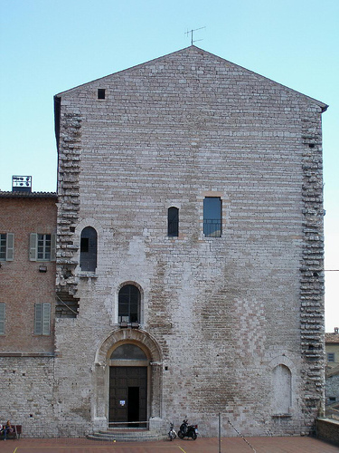 Palais du Podestà-Gubbio-Ombrie-Italie